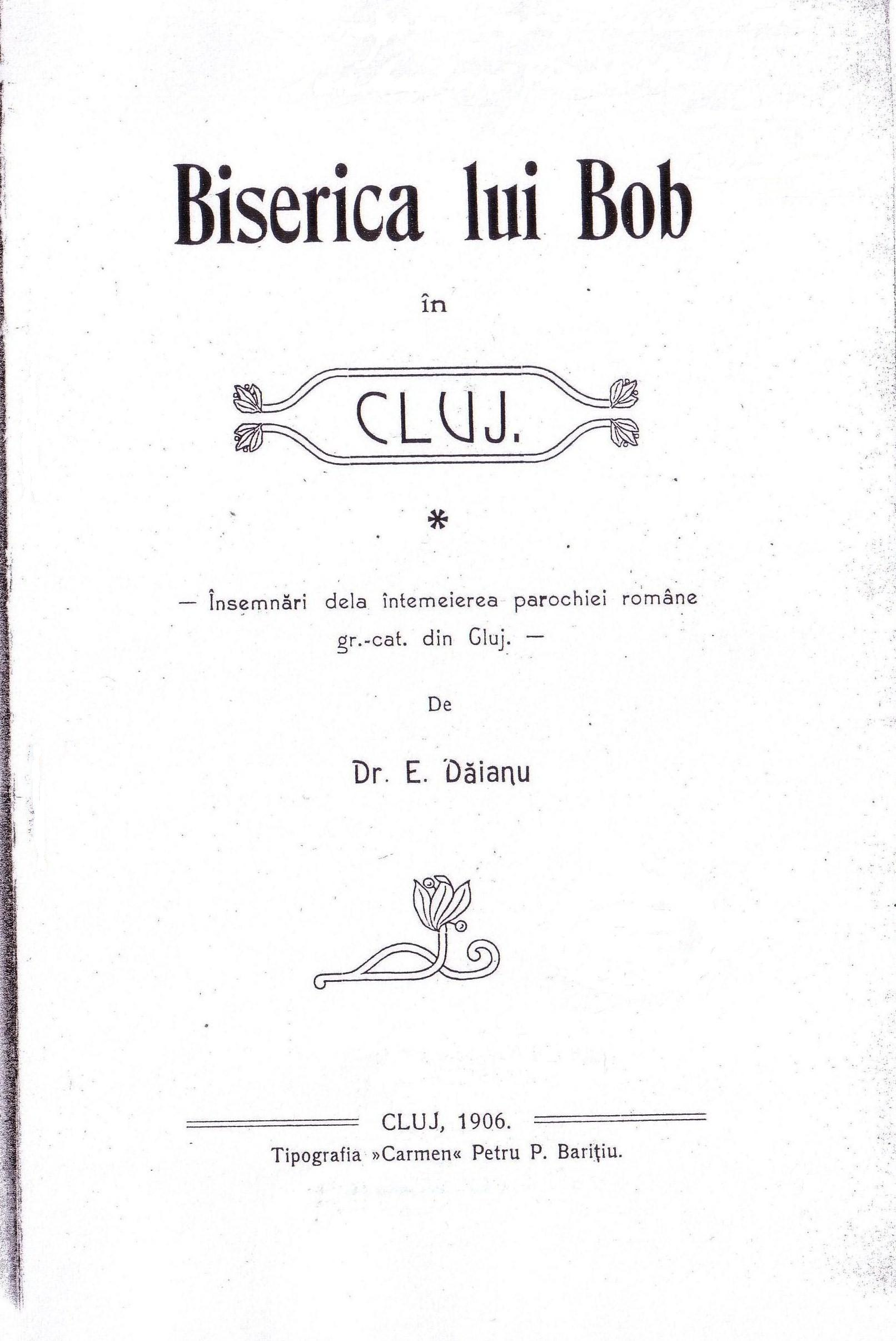 Prima pagina a monografiei protopopului Elie Daianu, monografie intitulata Biserica lui Bob in Cluj, Cluj 1906.